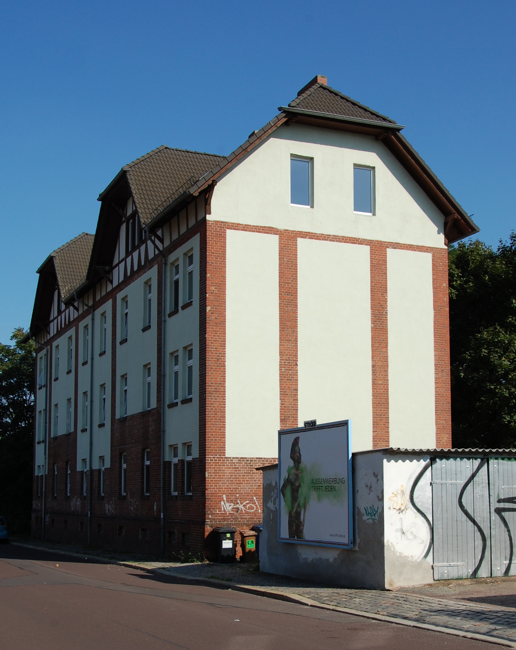 Haus Laaßstraße 2, 3 in Magdeburg